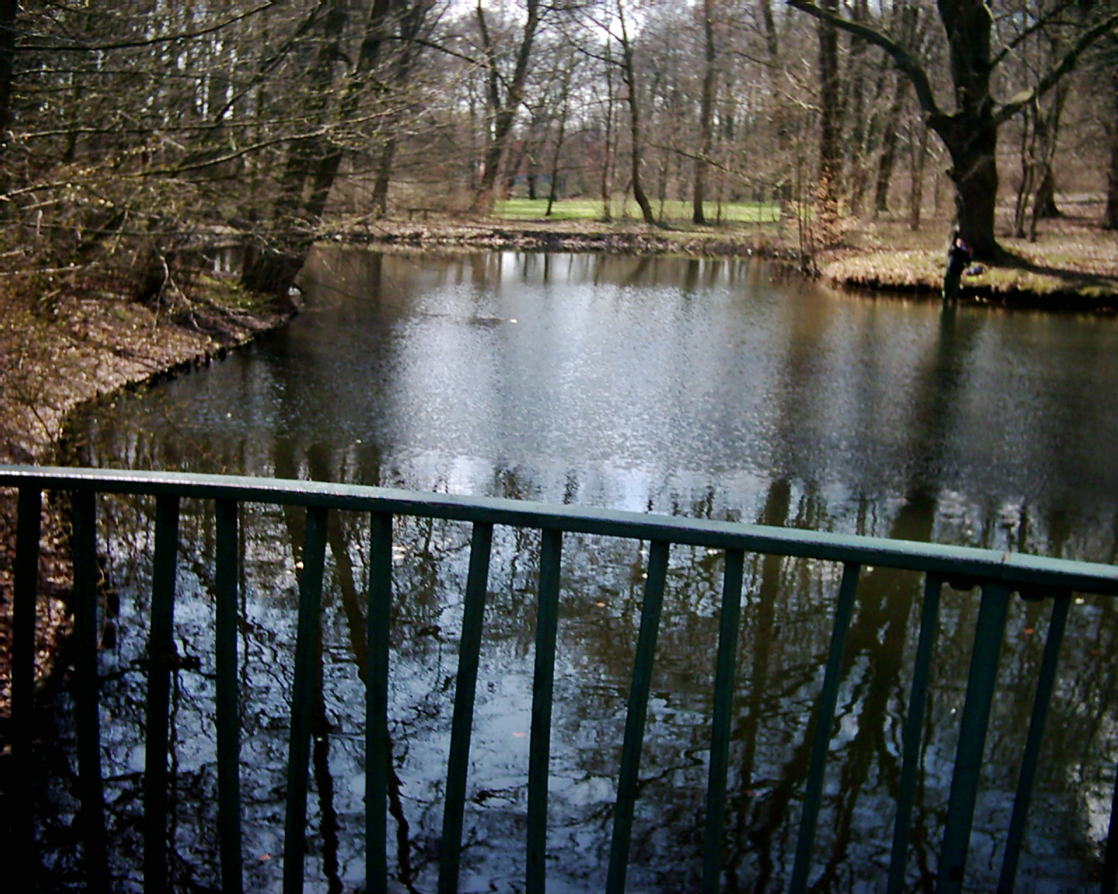 Der Parkteich am südlichen wo die zwei Äste zusammengeführt werden. Der Schlosspark Buch wurde 1607 als Schlosspark eingerichtet und 1803 unter Einbeziehung der Wasser der Panke mit seinem alten Baumbestand zum offenen Landschaftspark umgestaltet. Dabei bilden zwei große Parkteiche einen Wechsel zwischen Wegen, Landschaft und Gewässern. Seit 1907 ist der Schlosspark öffentlich zugänglich und findet Spaziergänger aus den Neubaugebieten der 1970er und 1980er Jahre, aus den Altenheimen und dem benachbarten Klinikum.